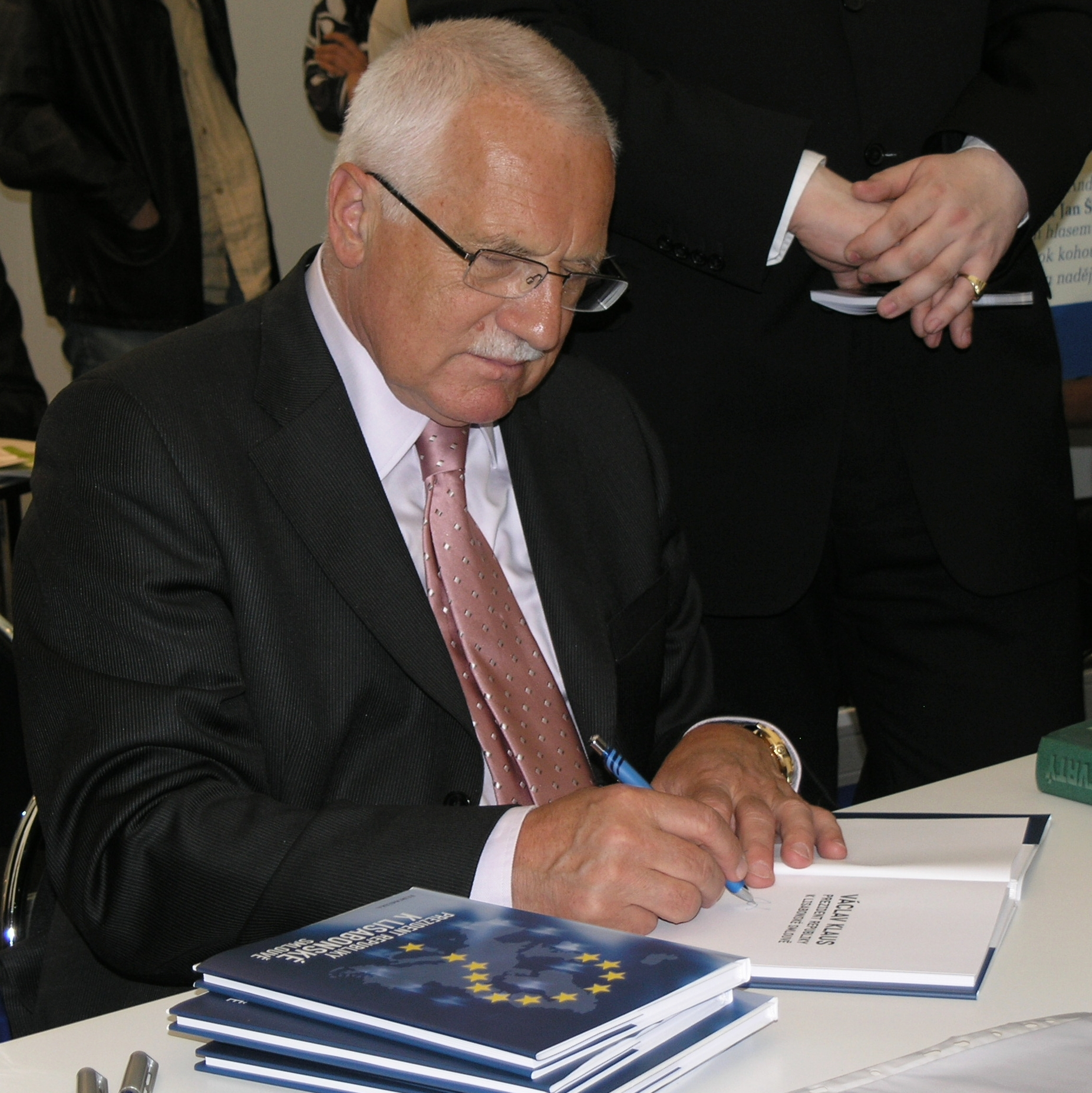 Praha, Svět knihy 2009 - Václav Klaus